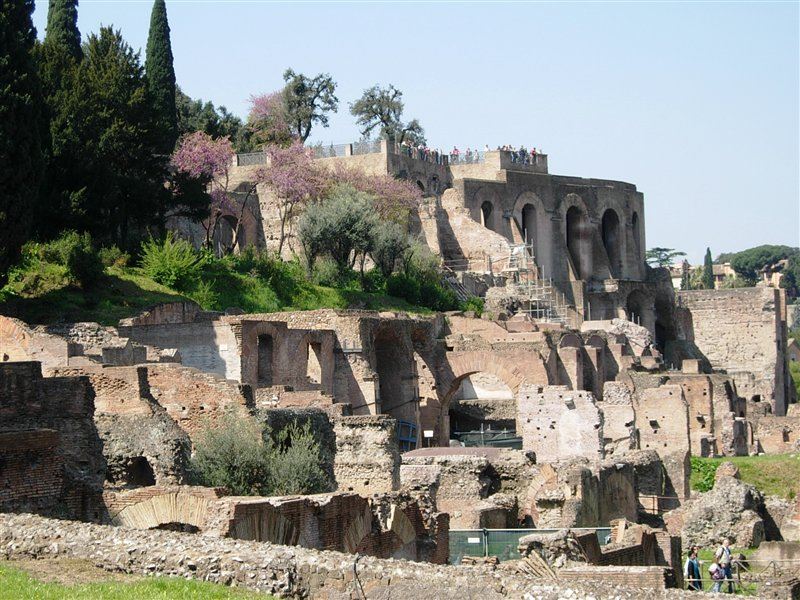 Rome Roman Forum